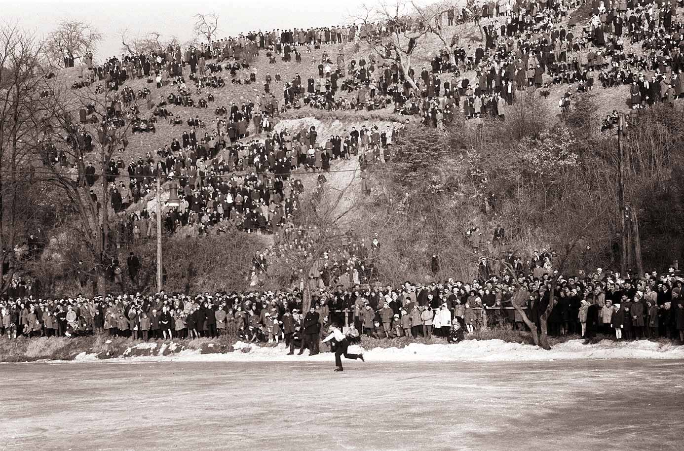 Velika drsalna revija pri Treh ribnikih v Mariboru